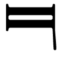 Maxima in Baroque notation